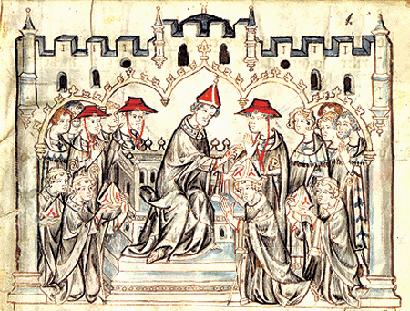 Balduin jmenován arcibiskupem